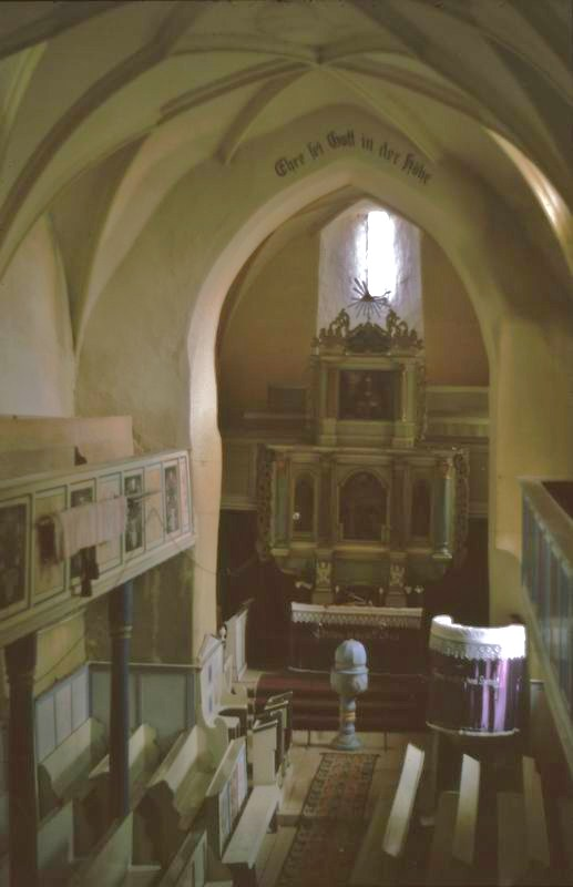 Kirchenburg Hundertbücheln (Movile) Chor (1993)